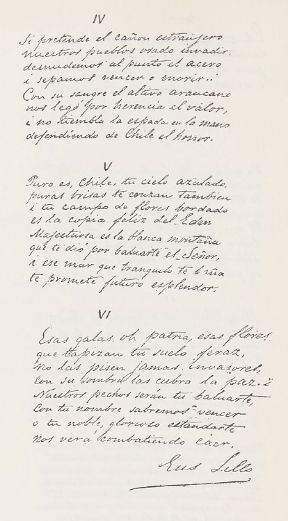 Segunda página del manuscrito de la canción nacional de Chile, con las modificaciones definitivas del año 1904, escrito de puño y mano por Eusebio Lillo y depositado en esa época en los archivos del Ministerio de Educación